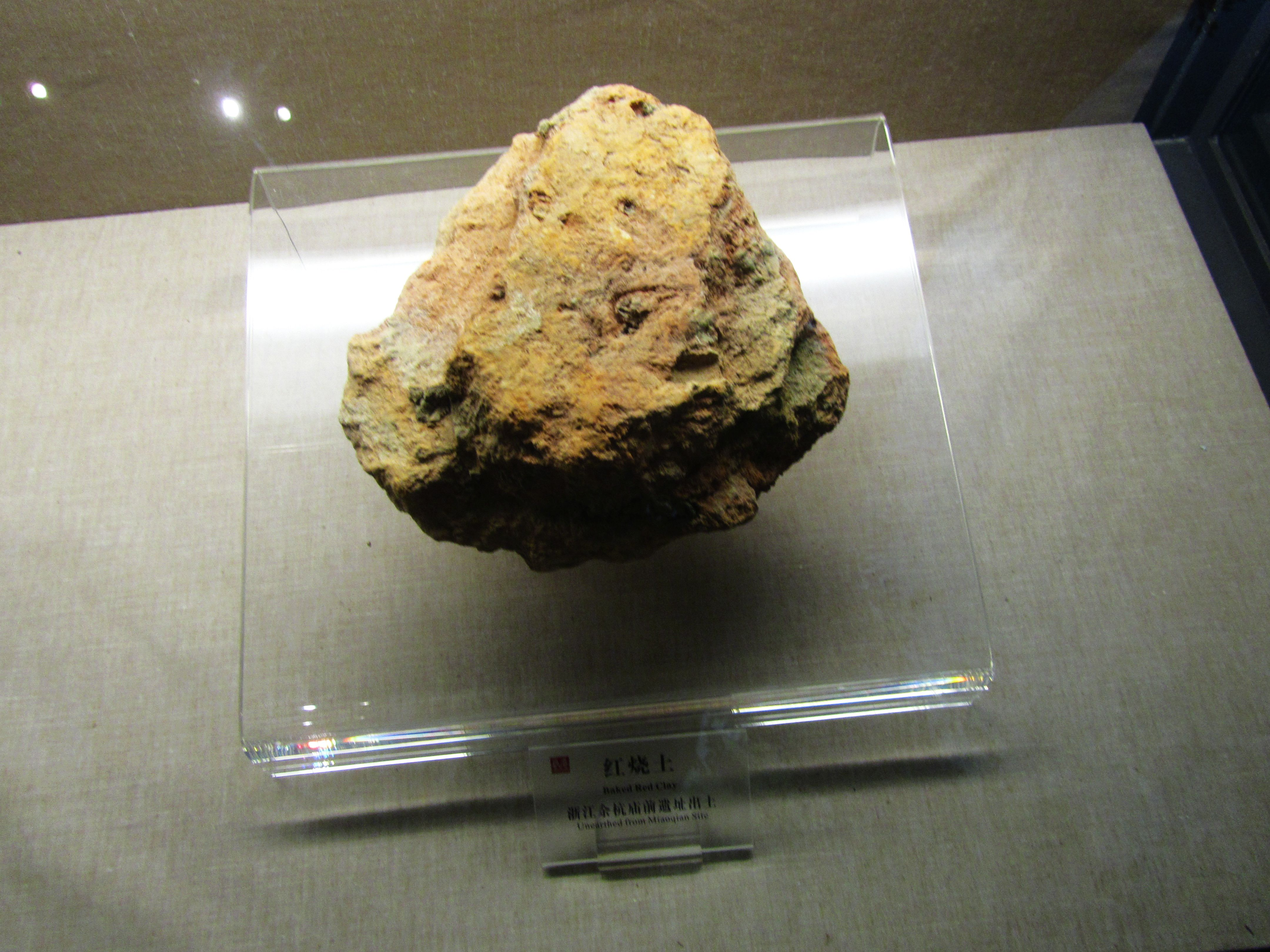 红烧土，浙江余杭庙前遗址出土，现藏良渚博物院。